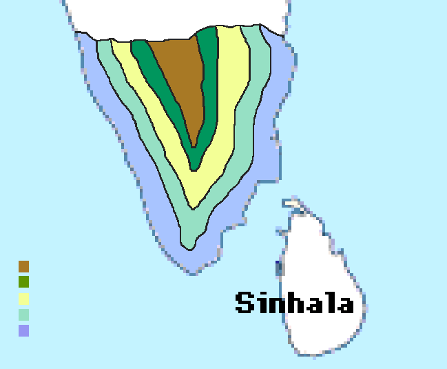 സംഘകാലത്തെ തിണകളുടേ ഒരു ഏകദേശ രൂപം, സോമൻ ഇളവം മൂടിൻറെ ഭാവനയിൽ, വരച്ചത് ചള്ളിയാൻ.